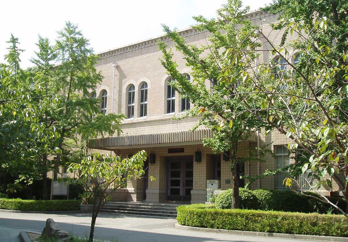 神戸大学社会科学系図書館 (旧制神戸商業大学図書館)。2006年8月。Hasec本人による撮影。